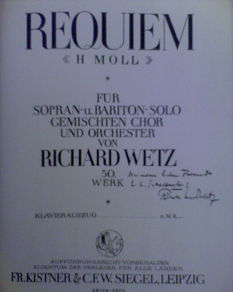 Titelblatt des Klavierauszuges des Requiems von Richard Wetz (1875-1935)